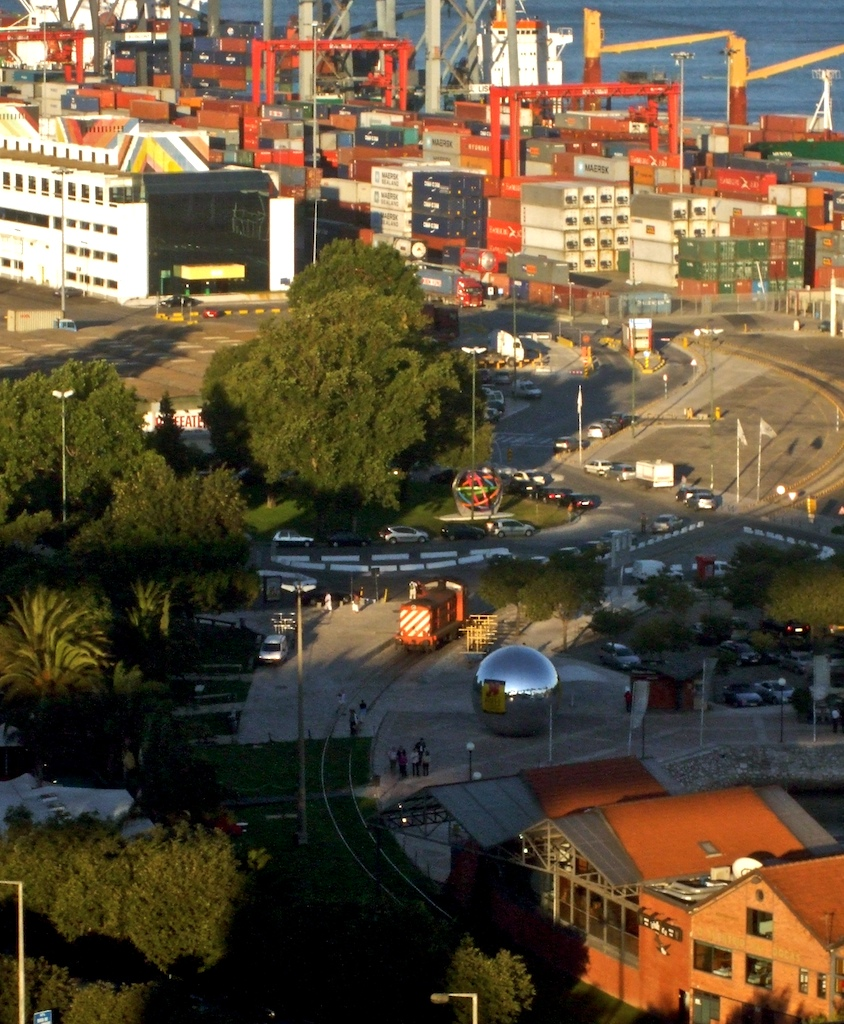 Local: Alcântara (Lisboa) [Ramal do Terminal da Liscont] Data e hora: 9 de Julho de 2008 [20h13] Material: Locomotiva 14xx [English Electric - Sorefame]